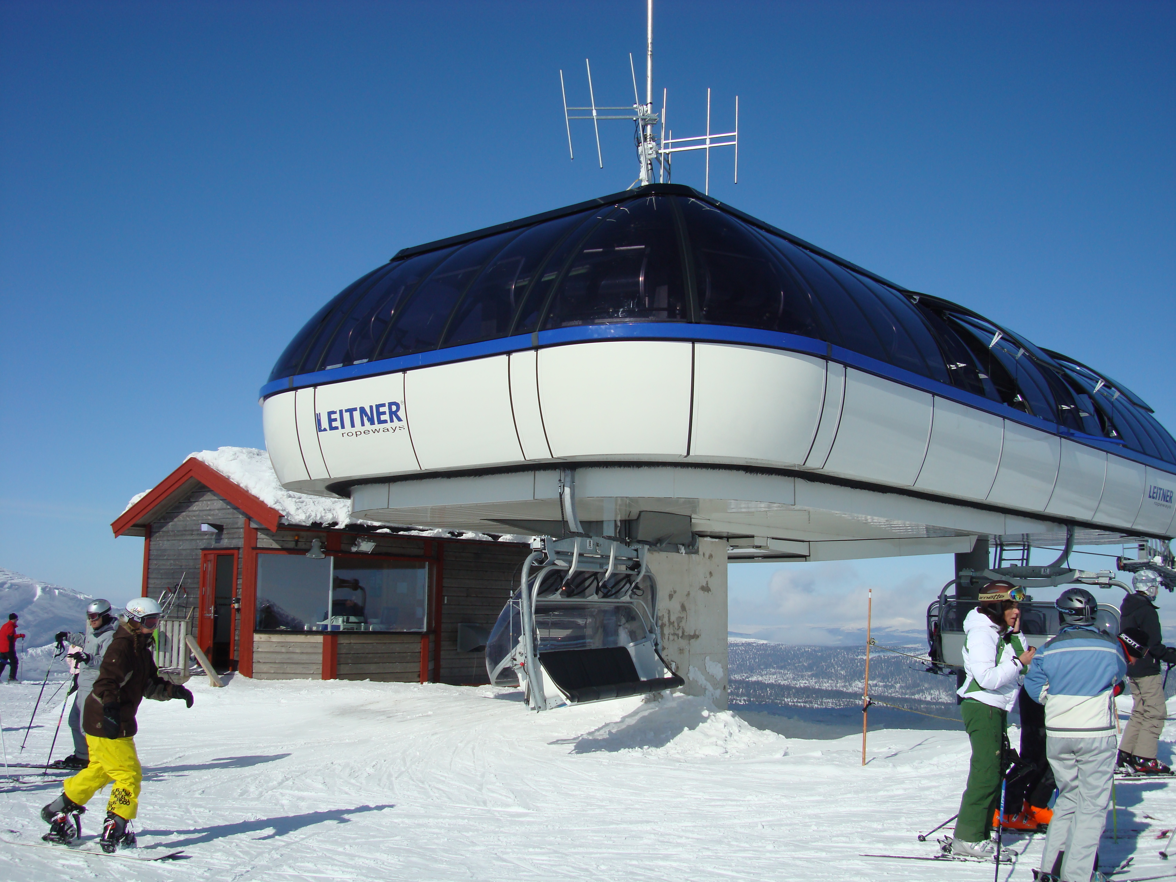 Toppekspressen i Trysil